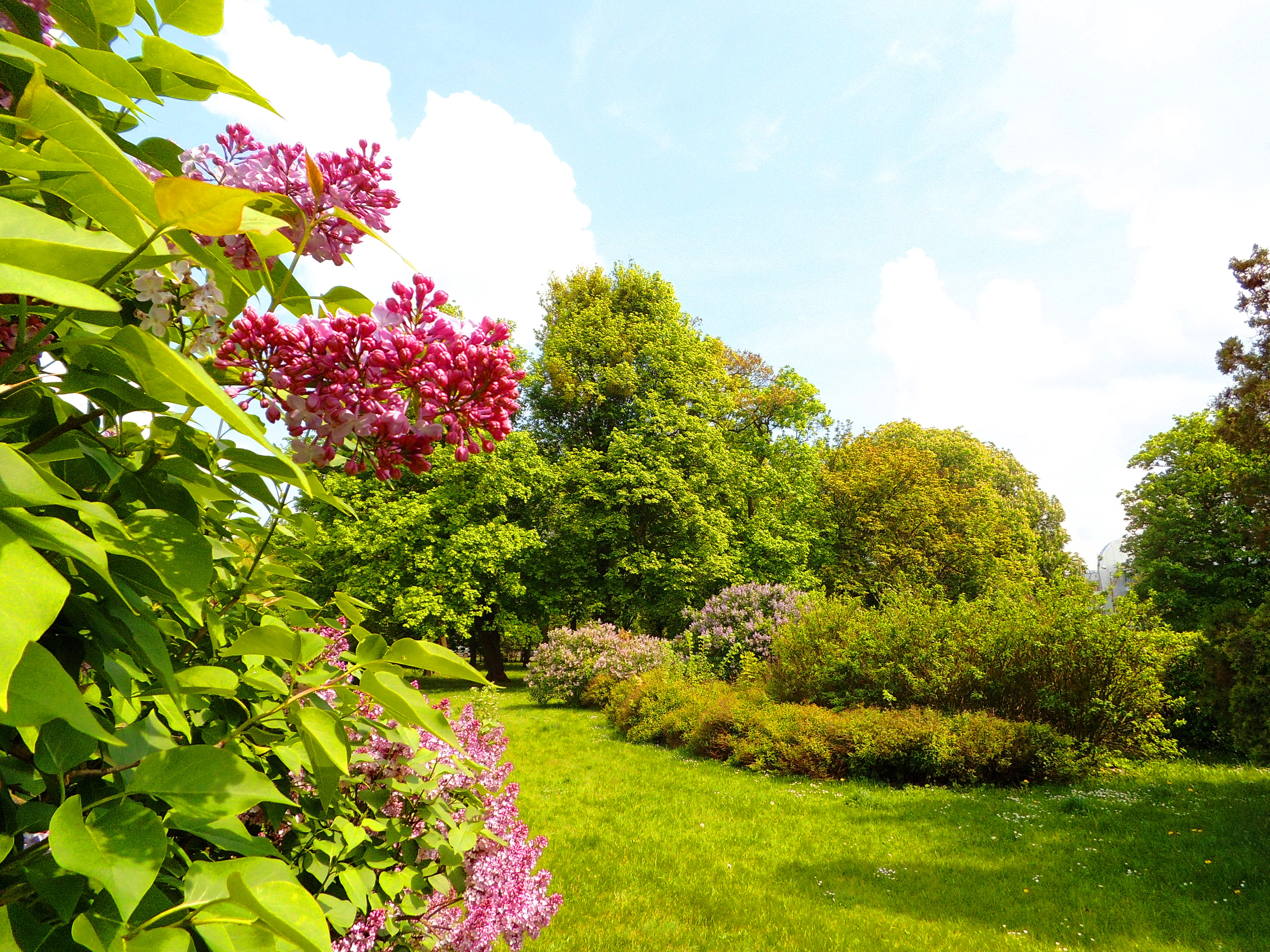 Ogród Muzyków w Toruniu, wiosna